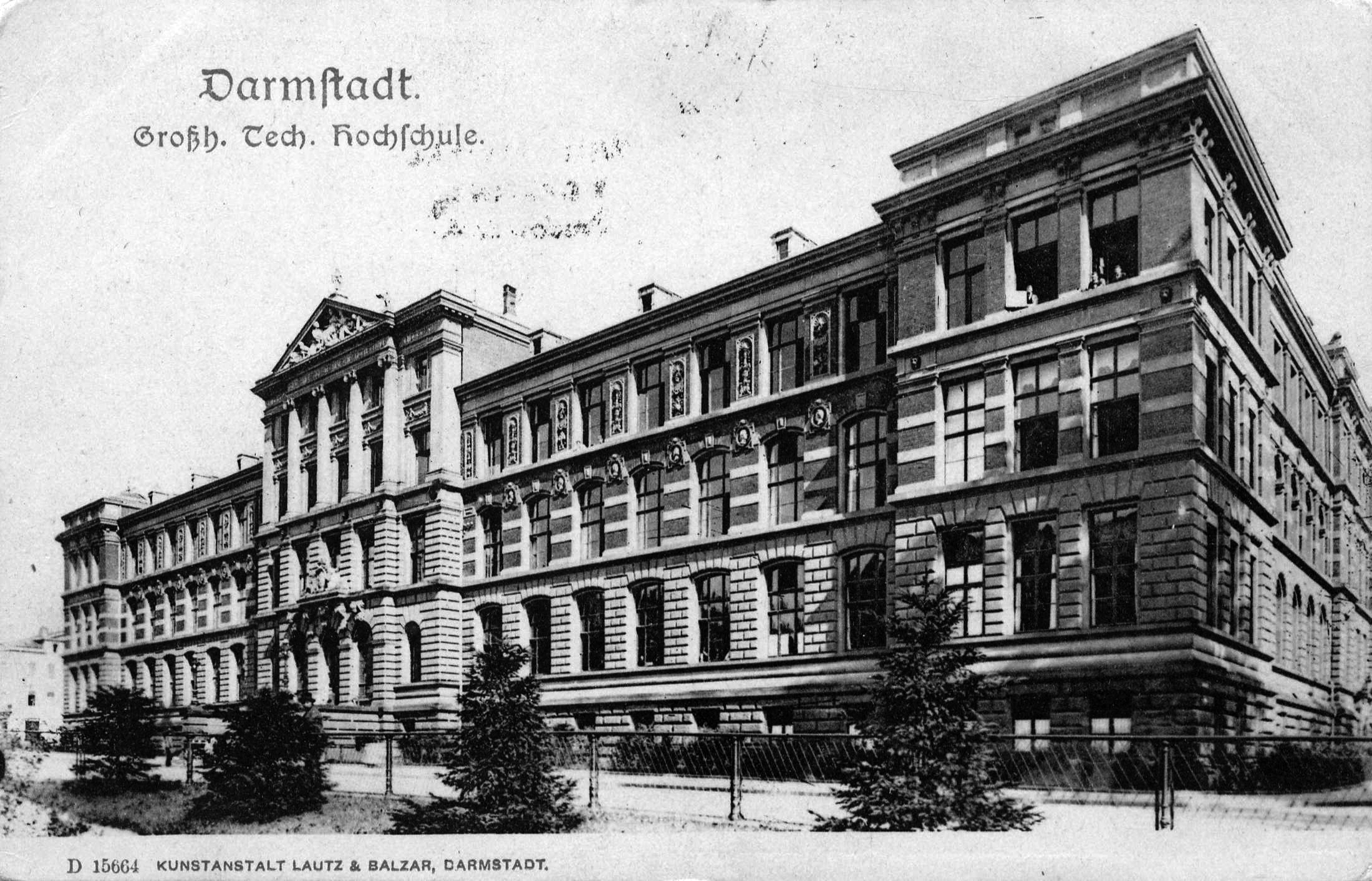 Ansichtskarte